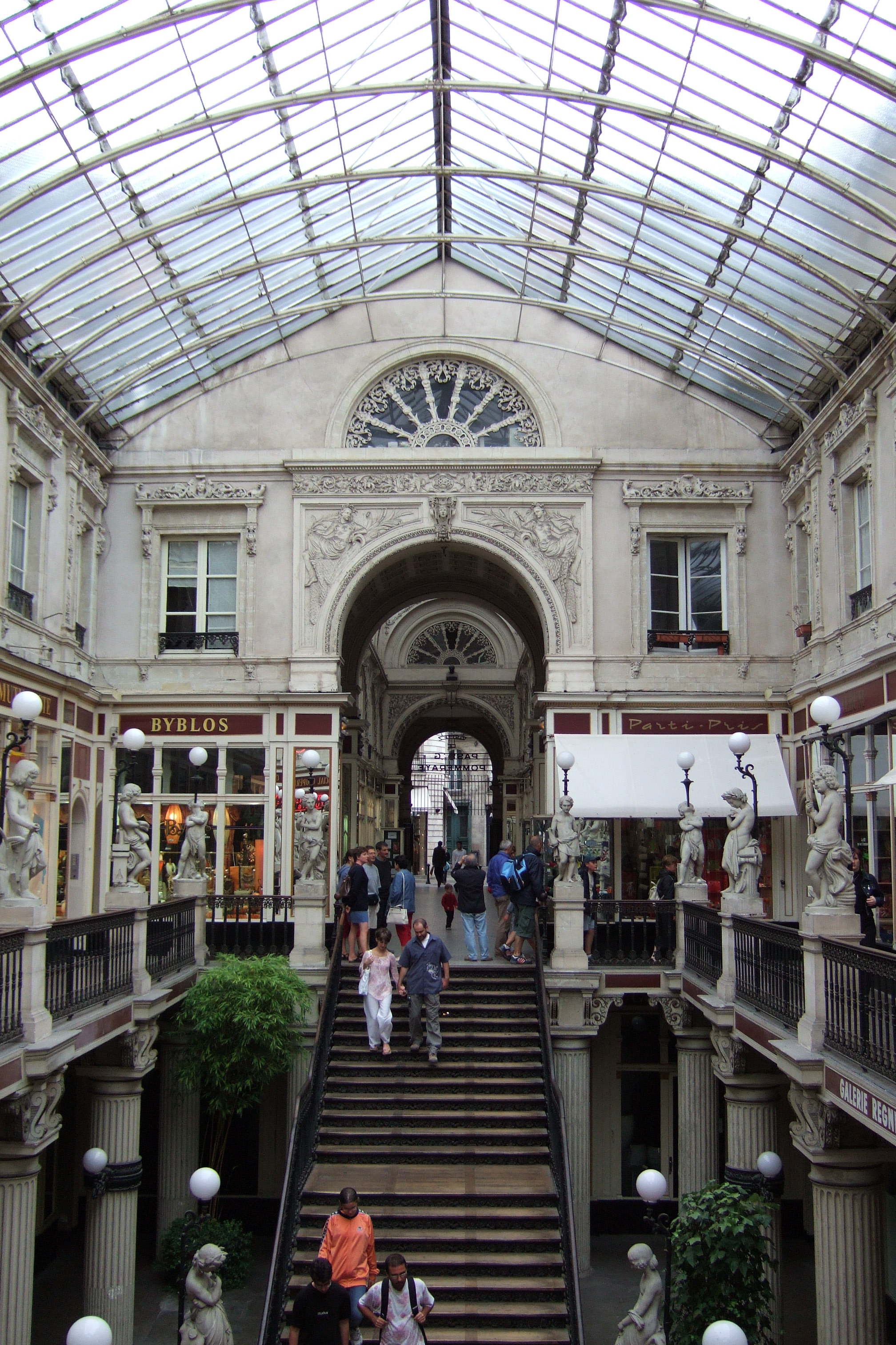 Le passage Pommeraye à Nantes